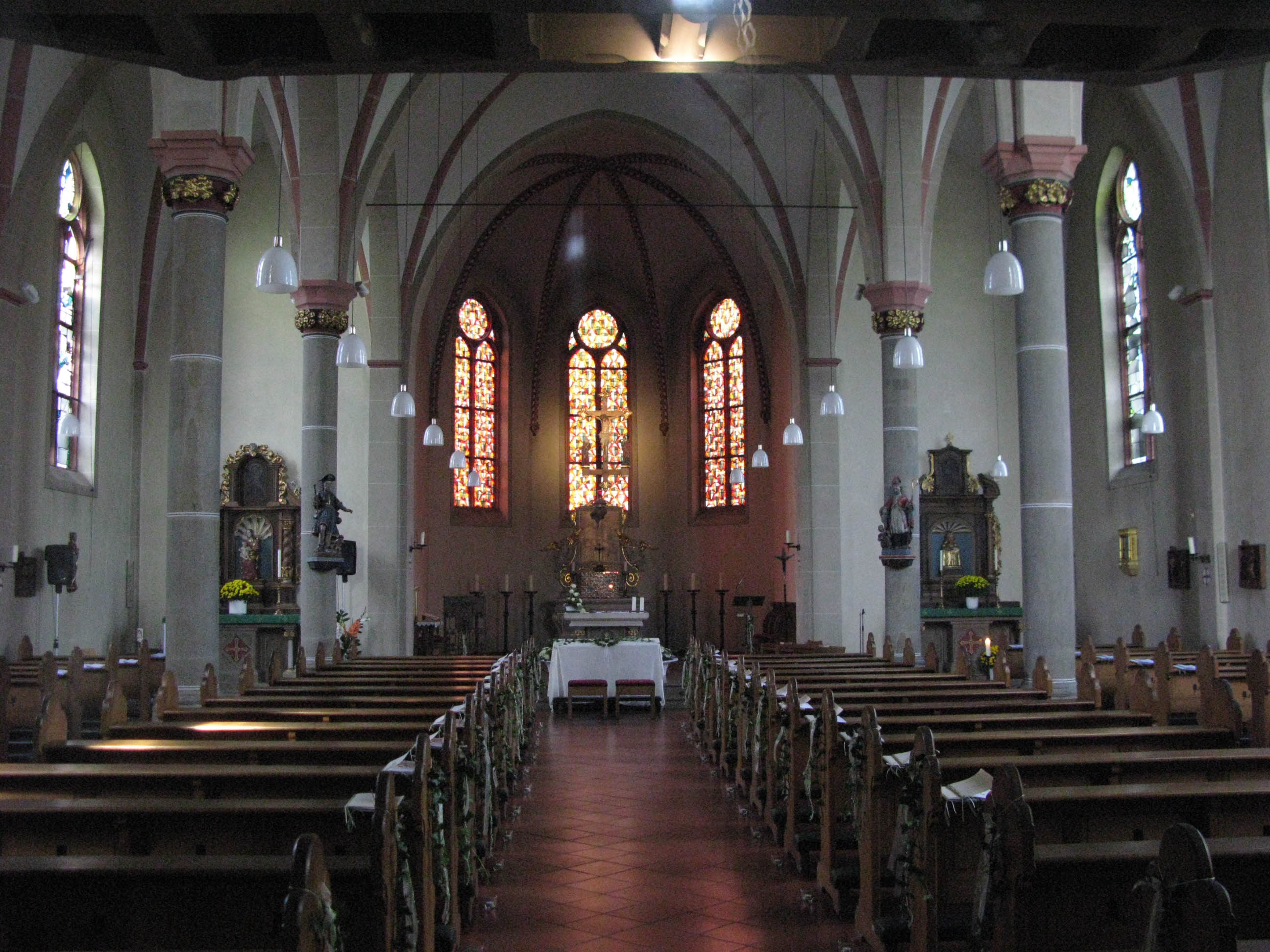 Kirchenschiff mit Blick auf den Chor der katholischen Pfarrkirche Sankt Martin in Stotzheim